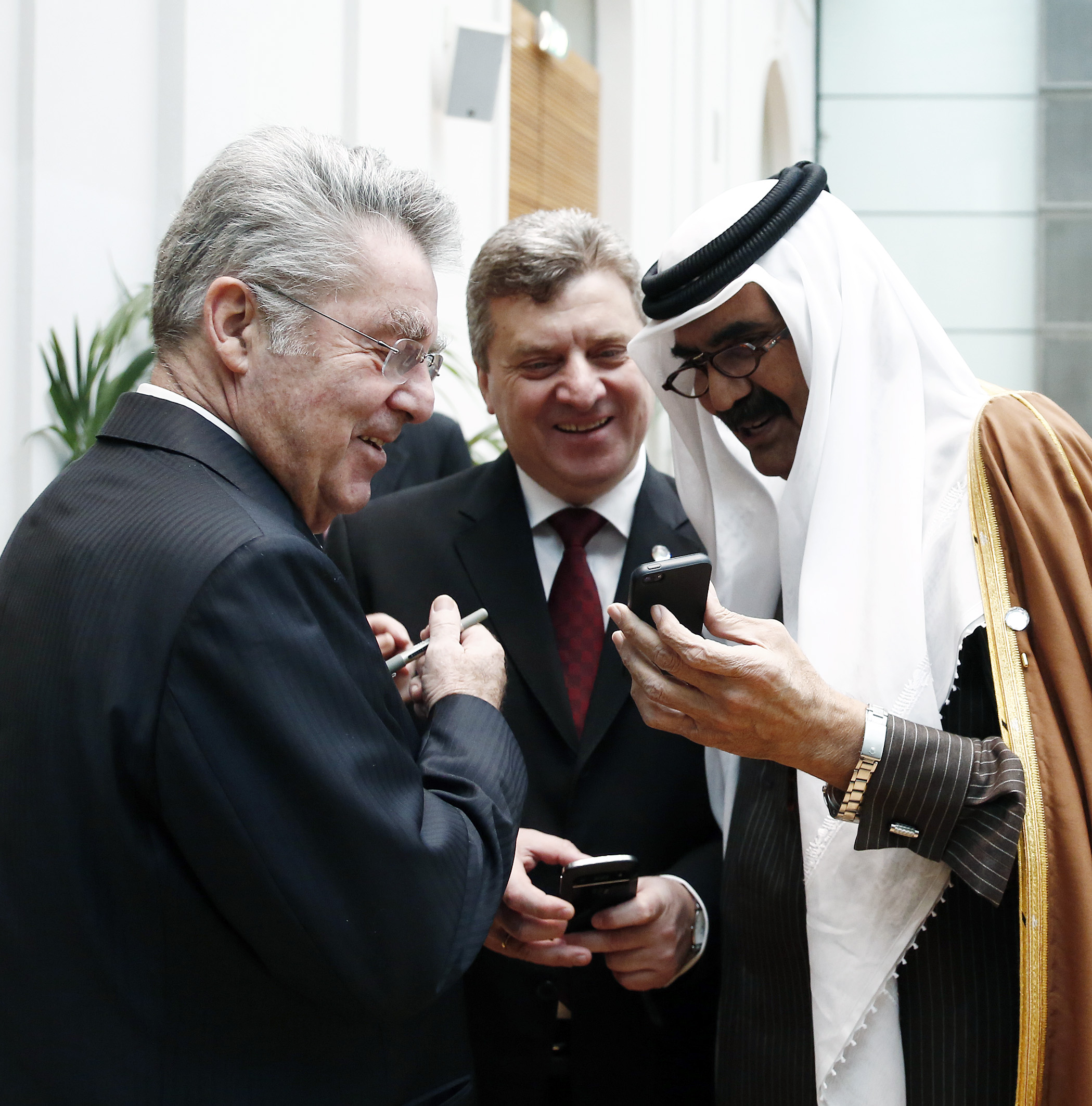 5. Global Forum der Allianz der Zivilisationen der Vereinten Nationen in Wien, 27./28. Februar 2013; Bundespräsident Heinz Fischer im Gespräch mit dem Emir von Katar, Hamad Bin Khalifa Al-Thani und dem mazedonischen Präsidenten Gjorge Ivanov; Foto: Dragan Tatic